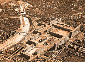 Première tranche de la cité du Chaperon-Vert